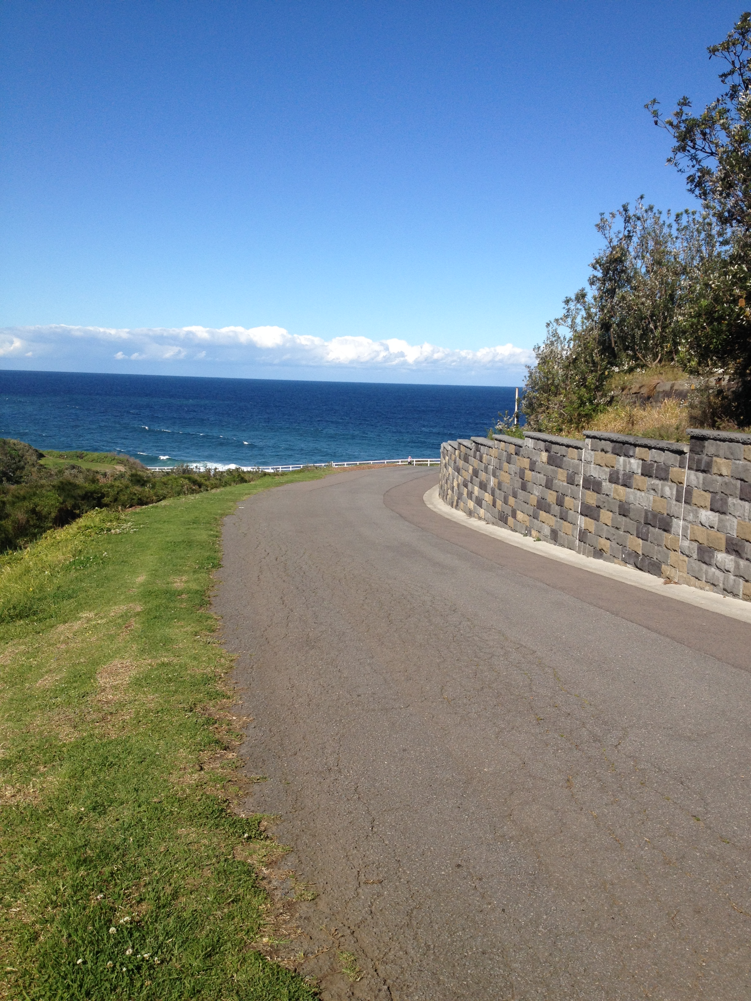 سواحل شهر نیوکاسل در نیوساوت ولز استرالیا